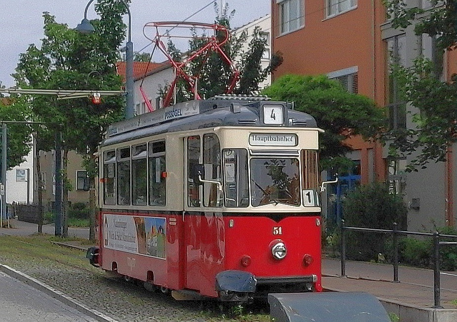 Wagen Nr. 51 der Naumburger Straßenbahn (nach Aufarbeitung 2016)